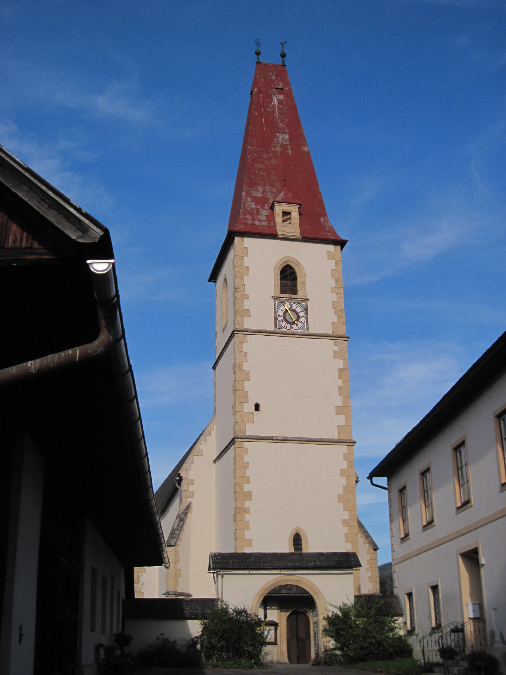 Kath. Pfarrkirche hl. Jakob der Ältere in Turnau